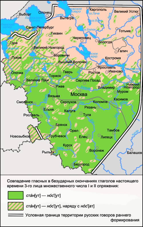 Карта распространения диалектного явления русского языка в области морфологии: совпадение гласных в безударных окончаниях глаголов настоящего времени 3-го лица множественного числа I и II спряжения стáн[ут] — нóс’[ут]. Источник: Захарова К. Ф., Орлова В. Г., Сологуб А. И., Строганова Т. Ю. Образование севернорусского наречия и среднерусских говоров / Ответственный редактор В. Г. Орлова. — М.: «Наука», 1970. — с. 153 (карта 42)